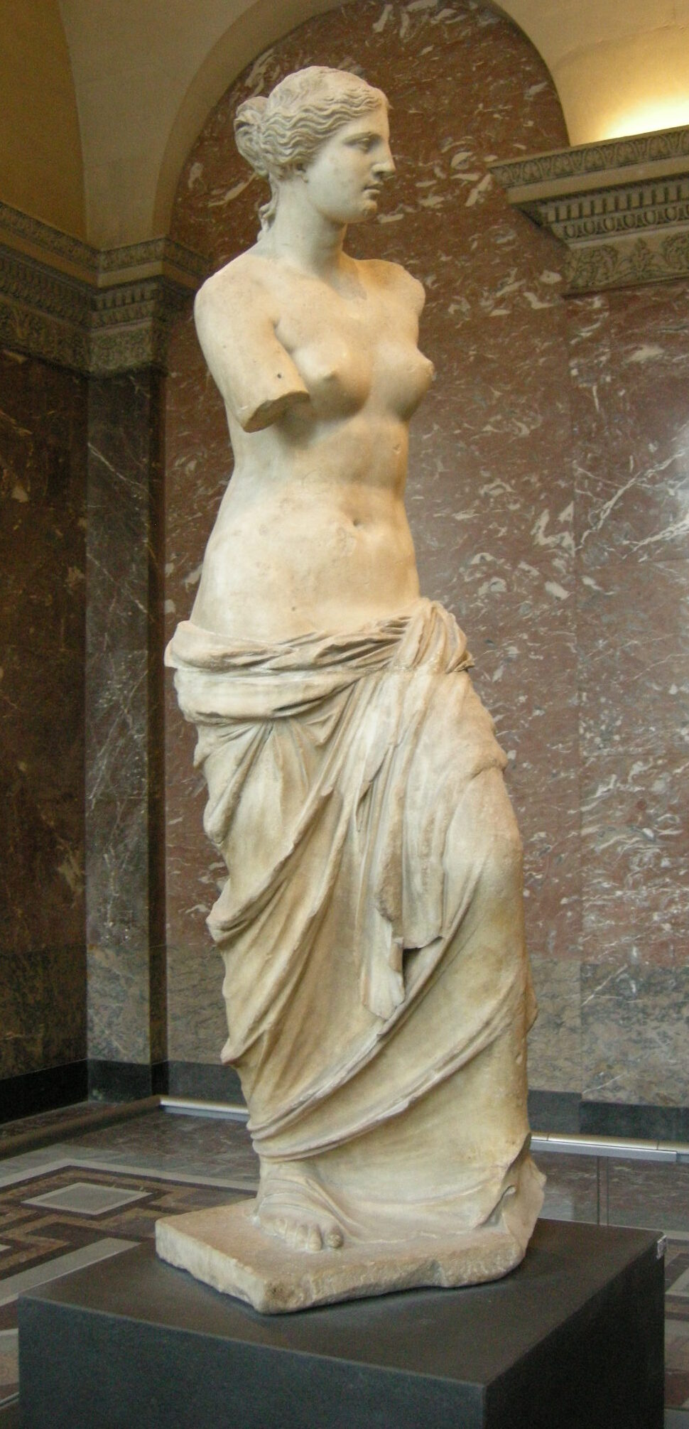 Venere di Milo 02.JPG